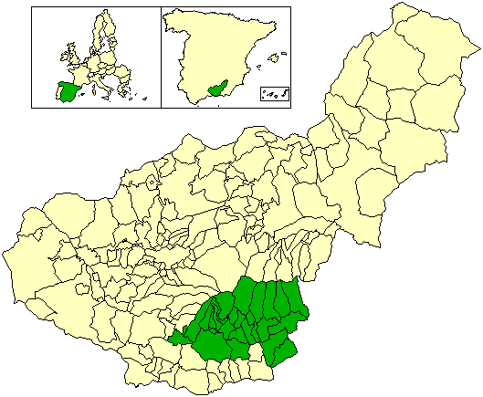 Mapa del partido judicial de Órgiva, en la provincia de Granada (España)